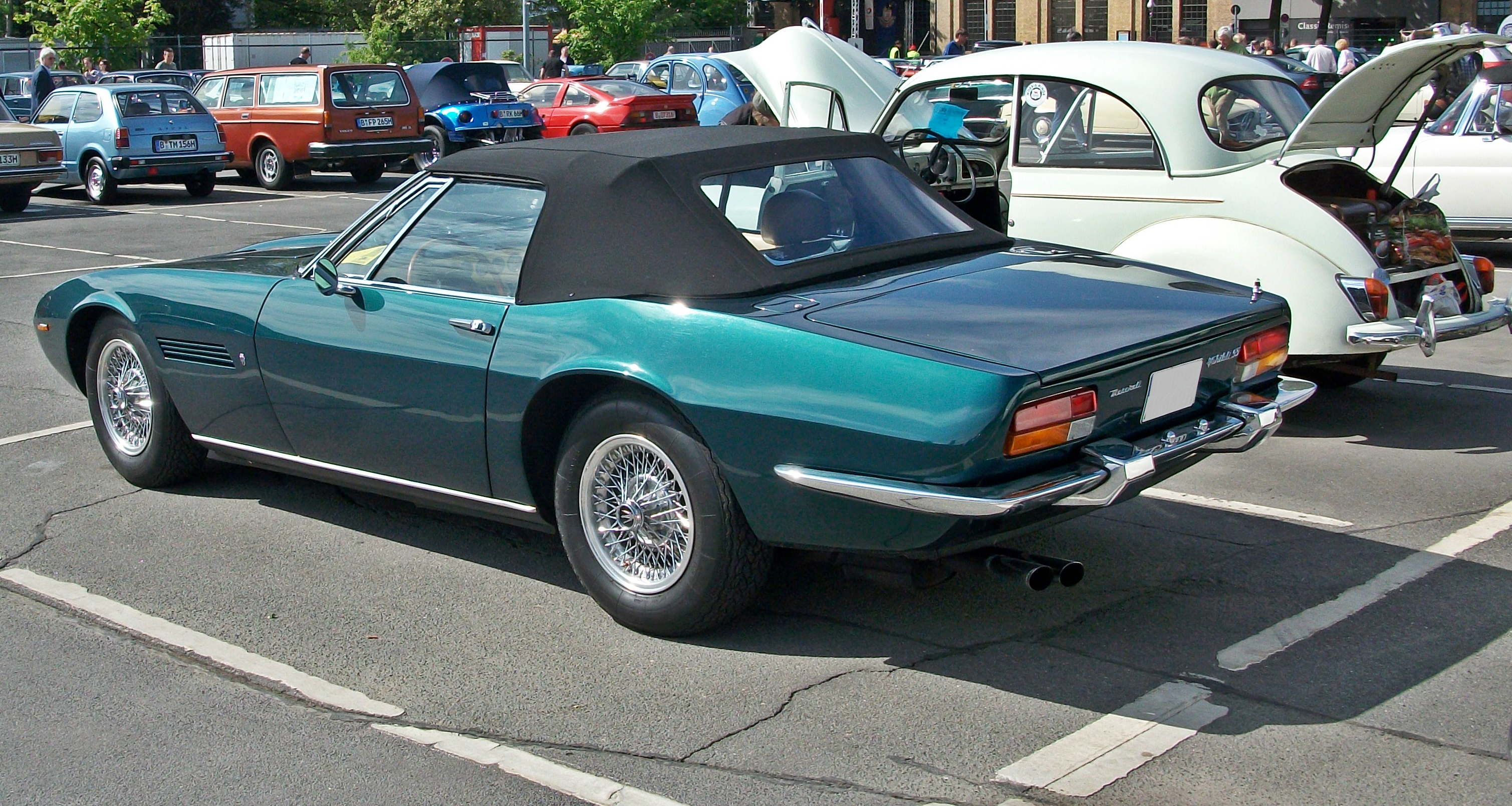 Oldtimer-Tage Berlin 2013